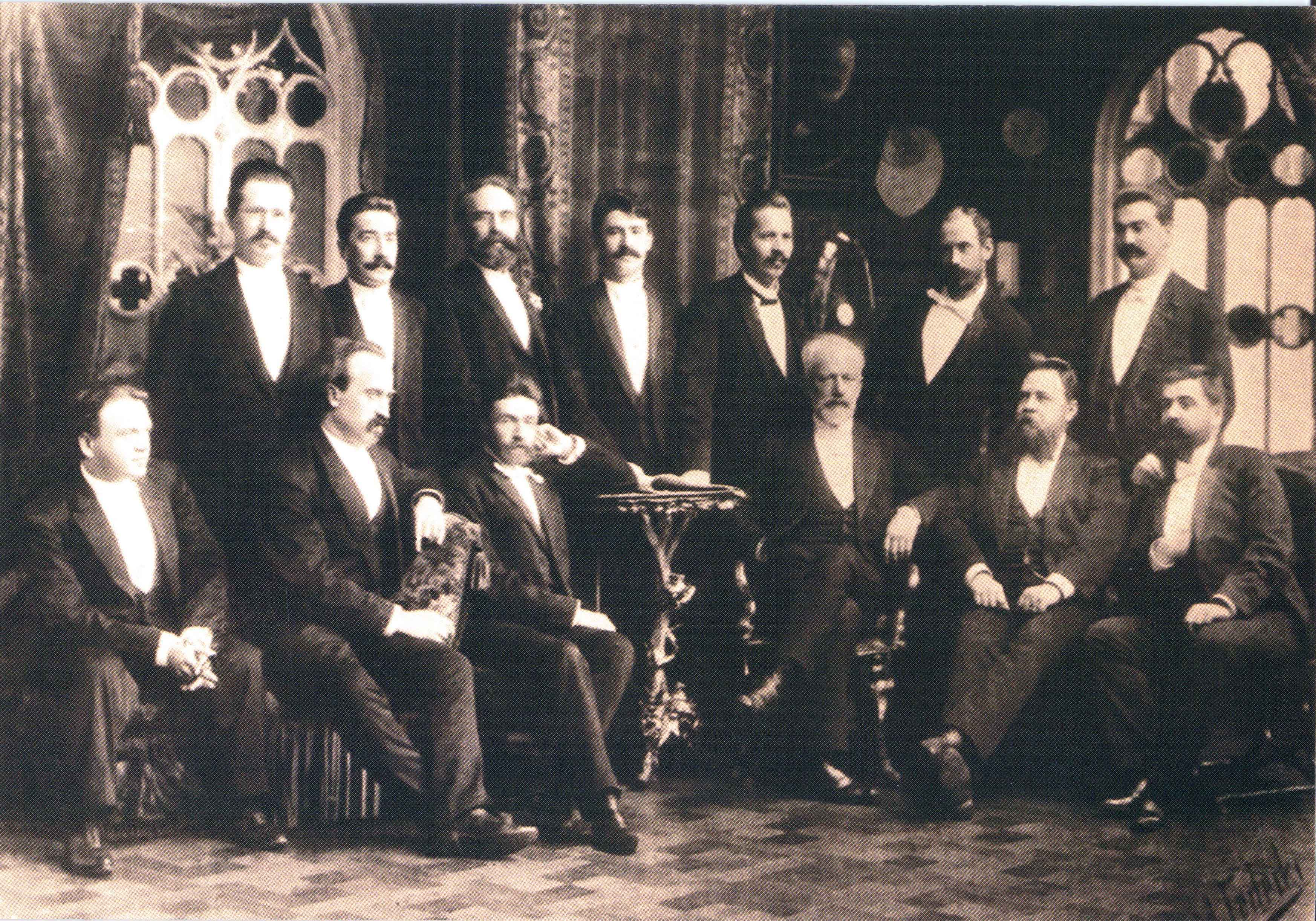 Pyotr Ilyich Tchaikovsky in Kharkov. 1893